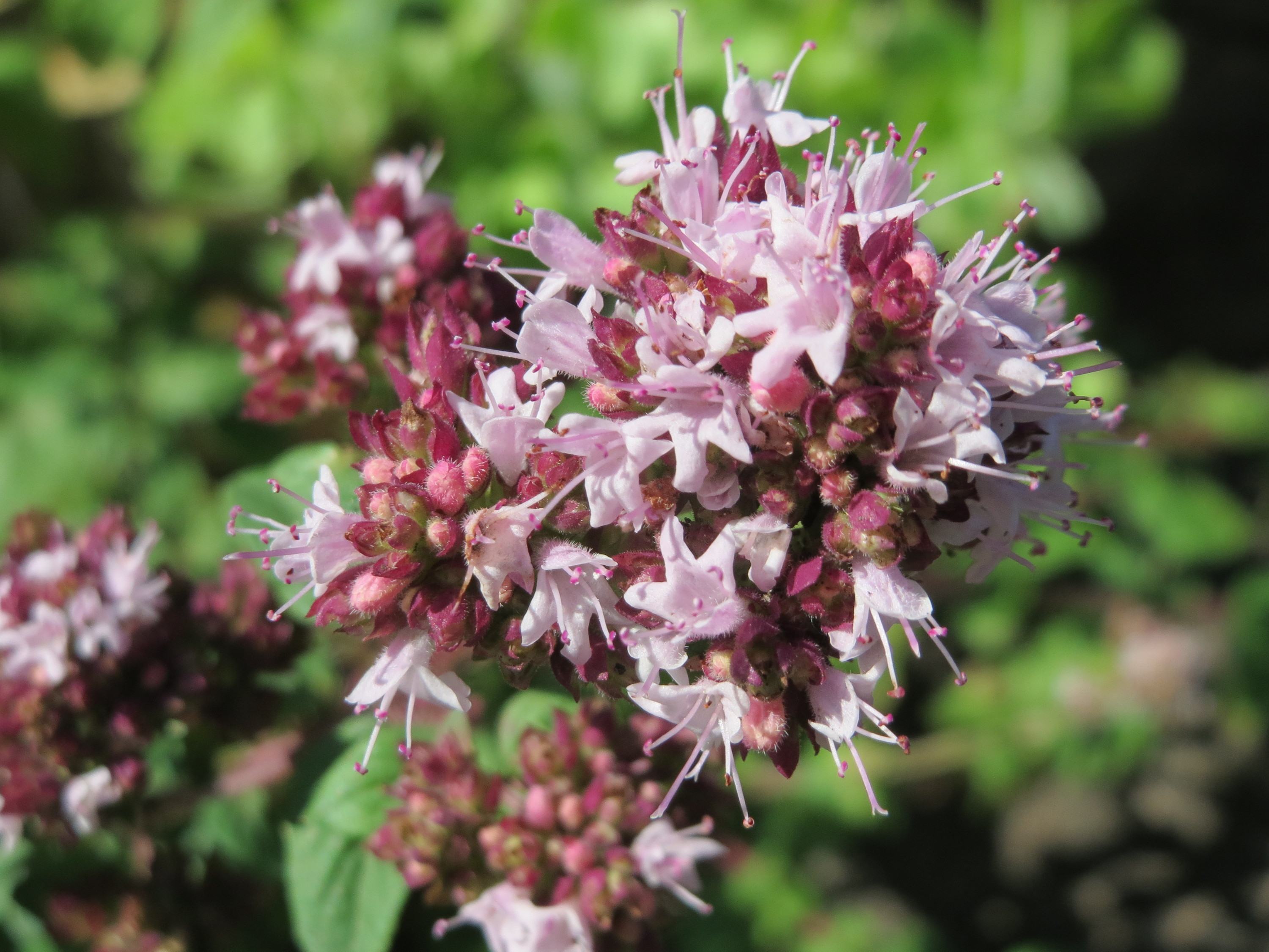 Oregano (Origanum vulgare) in Hockenheim